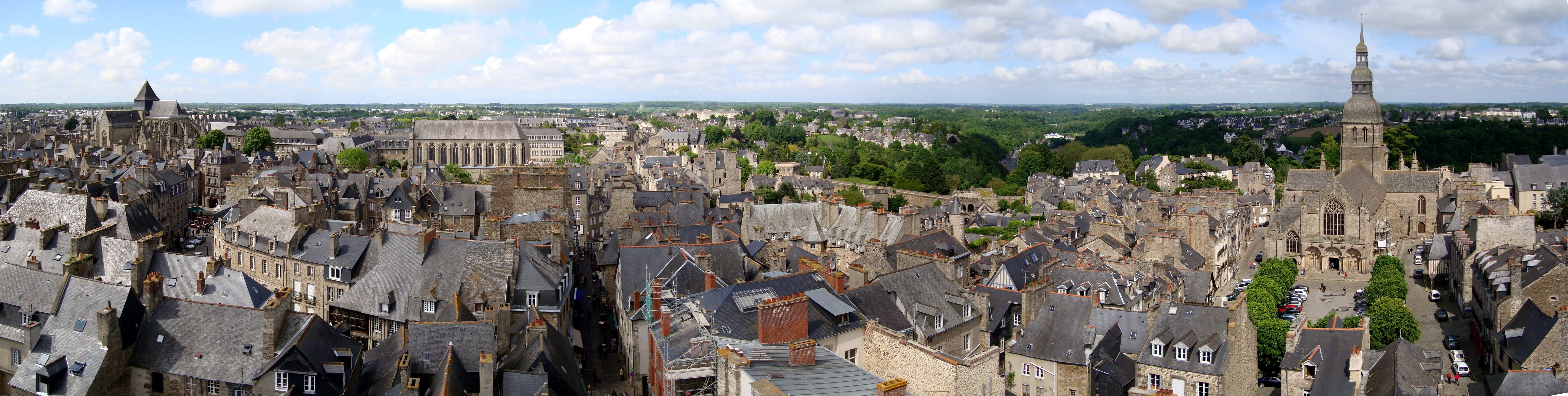 Vue de Dinan (Côtes-d'Armor) depuis la tour de l'horloge : de l'église Saint-Malo (à gauche) à la basilique Saint-Sauveur (à droite).